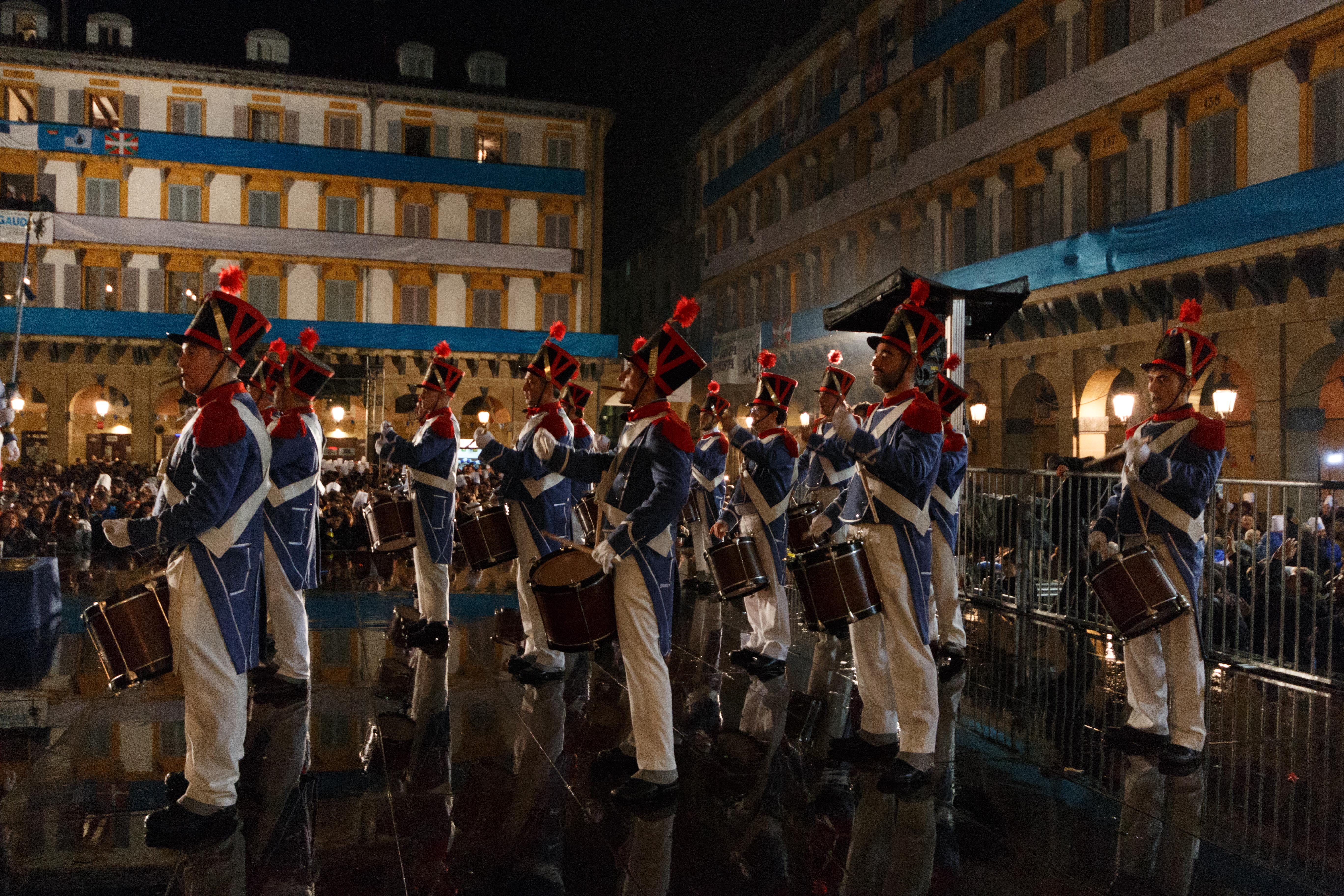 Donostiako danborrada This is a photography of a Folklore festival in Spain (Wikidata id Q2613306).